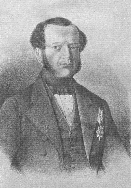 Гедеонов, Александр Михайлович